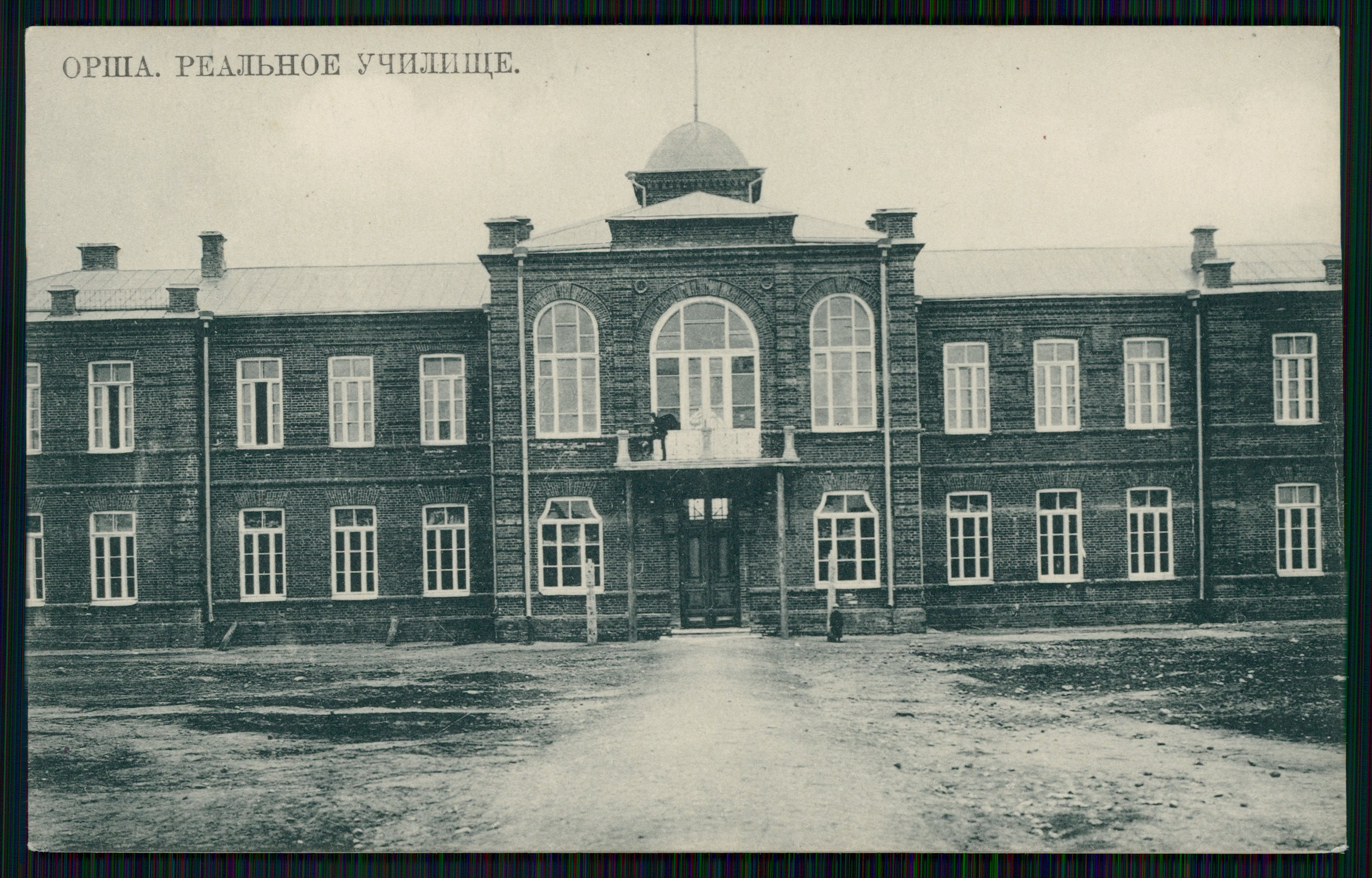 Беларуская (тарашкевіца): Ворша (Vorša), вуліца Бабінавіцкая (vulica Babinavickaja). Рэальная вучэльня